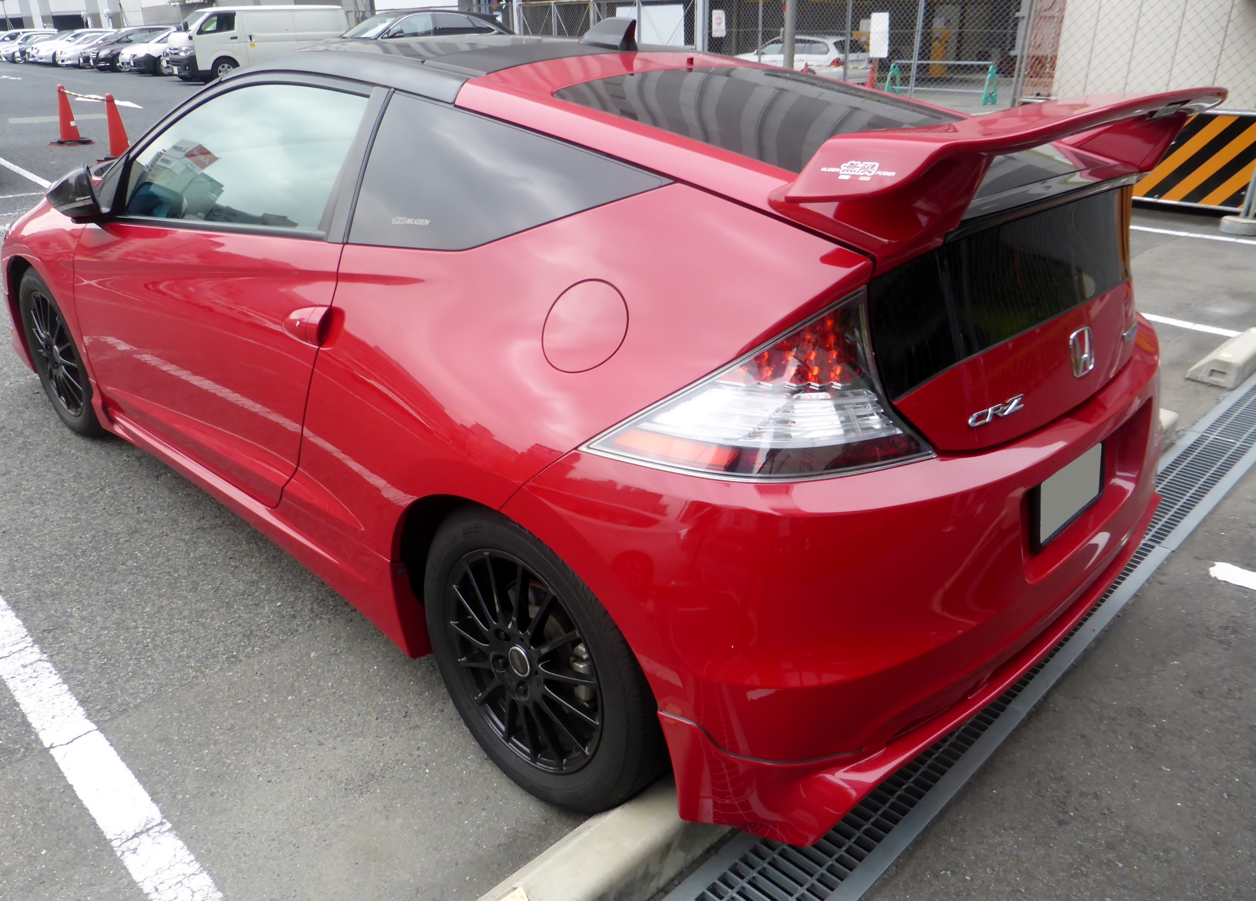 無限パーツを装着したZF2型ホンダ・CR-Z α マスターレーベル2トーンカラースタイルをリアから撮影。